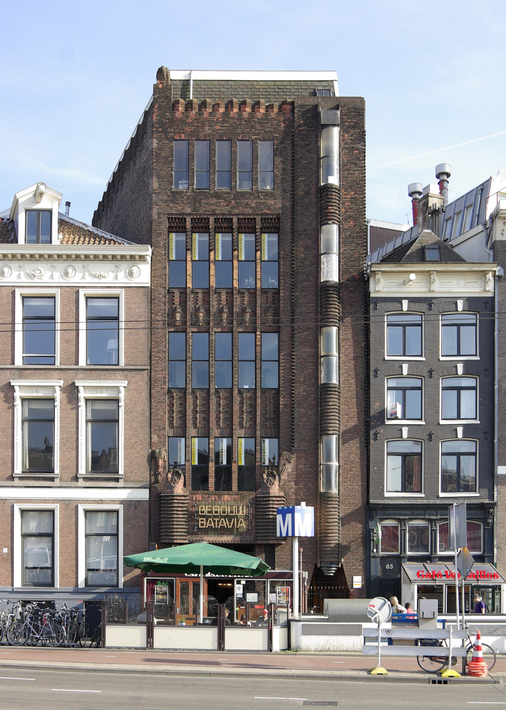 Gebouw Batavia, Prins Hendrikkade 84-85, Amsterdam 82″ N, 4° 54′ 06.22″ E